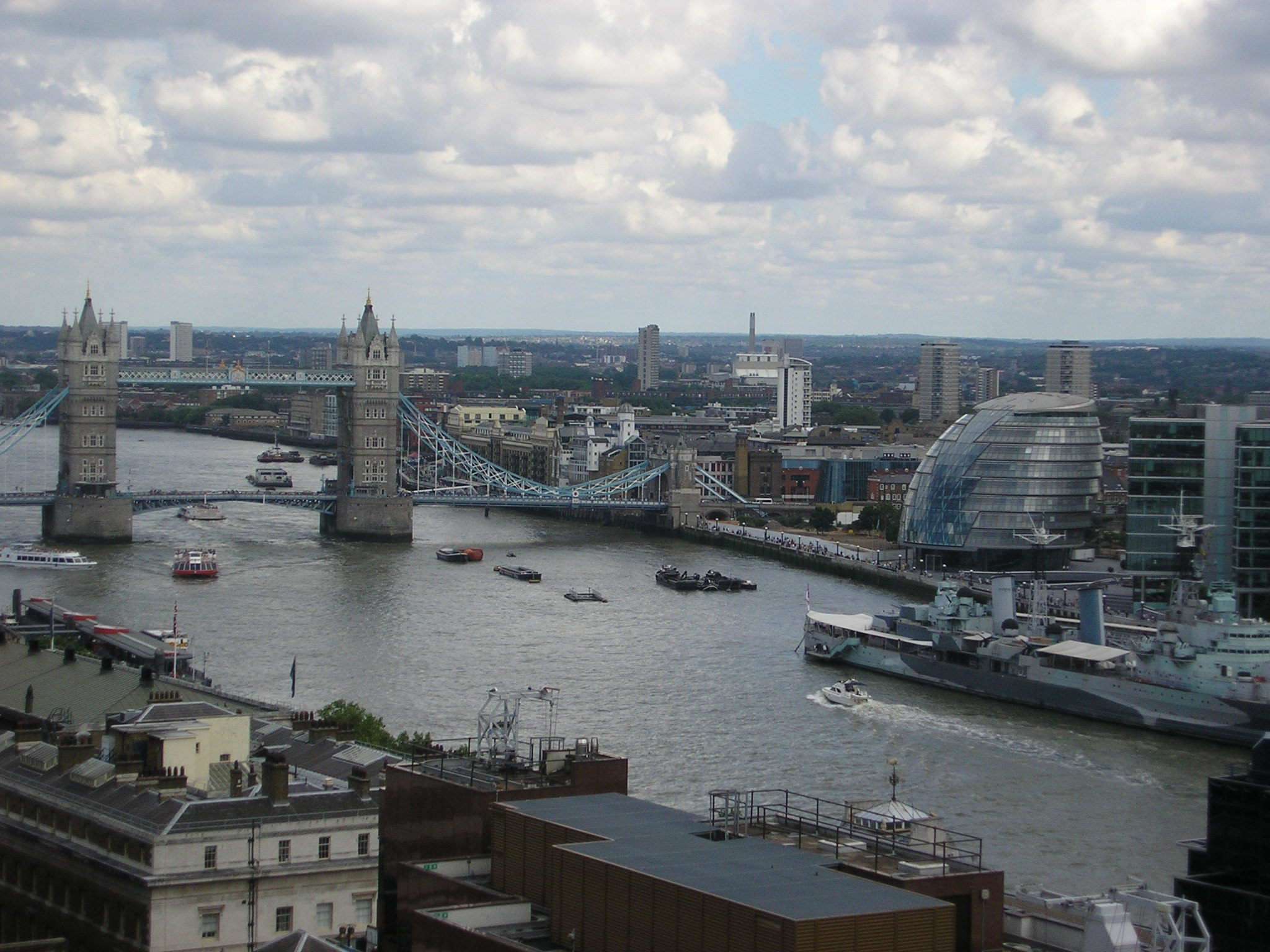 El Puente de la Torre, HMS Belfast y el Ayuntamiento de Londres desde el Monumento al Gran Incendio de Londres